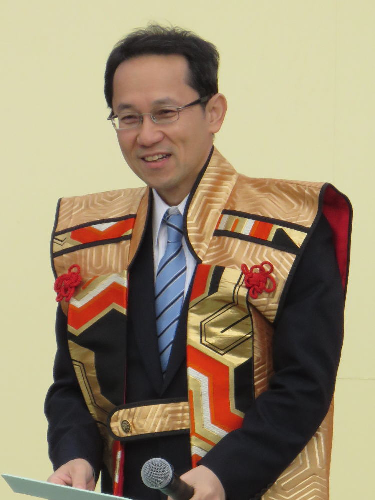 将棋棋士の井上慶太（平成２８年１１月、姫路市で行われた人間将棋にて）